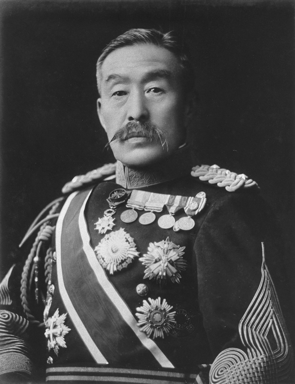 Portrait of Kawamura Kageaki (川村景明, 1850 – 1926)